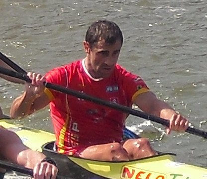 Jorge Alonso en el Mundial de 2009